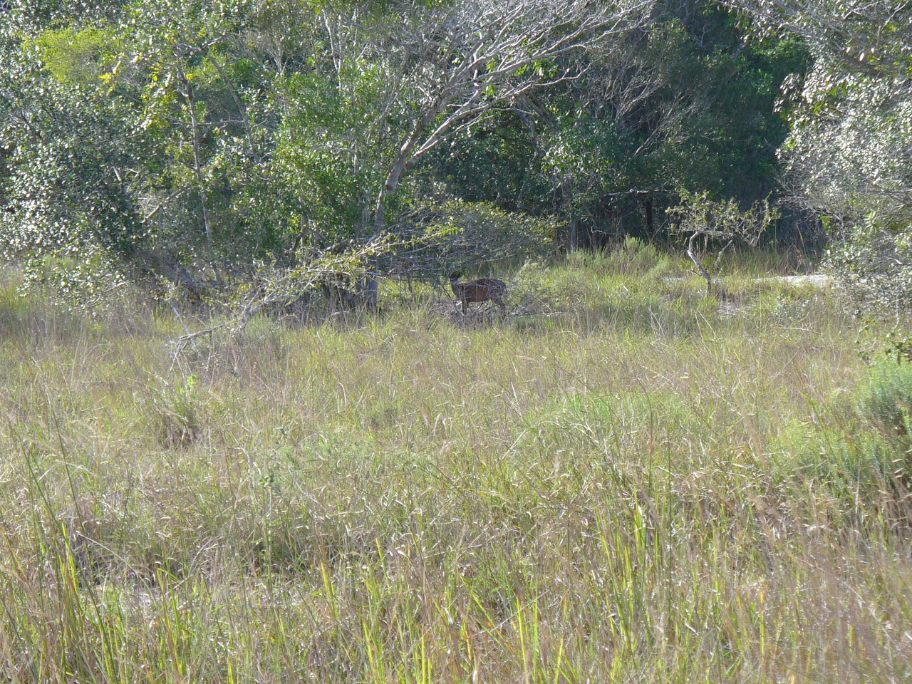 Ignorância a parte, se trata de um antílope chamado Red Duiker. Para saber mais